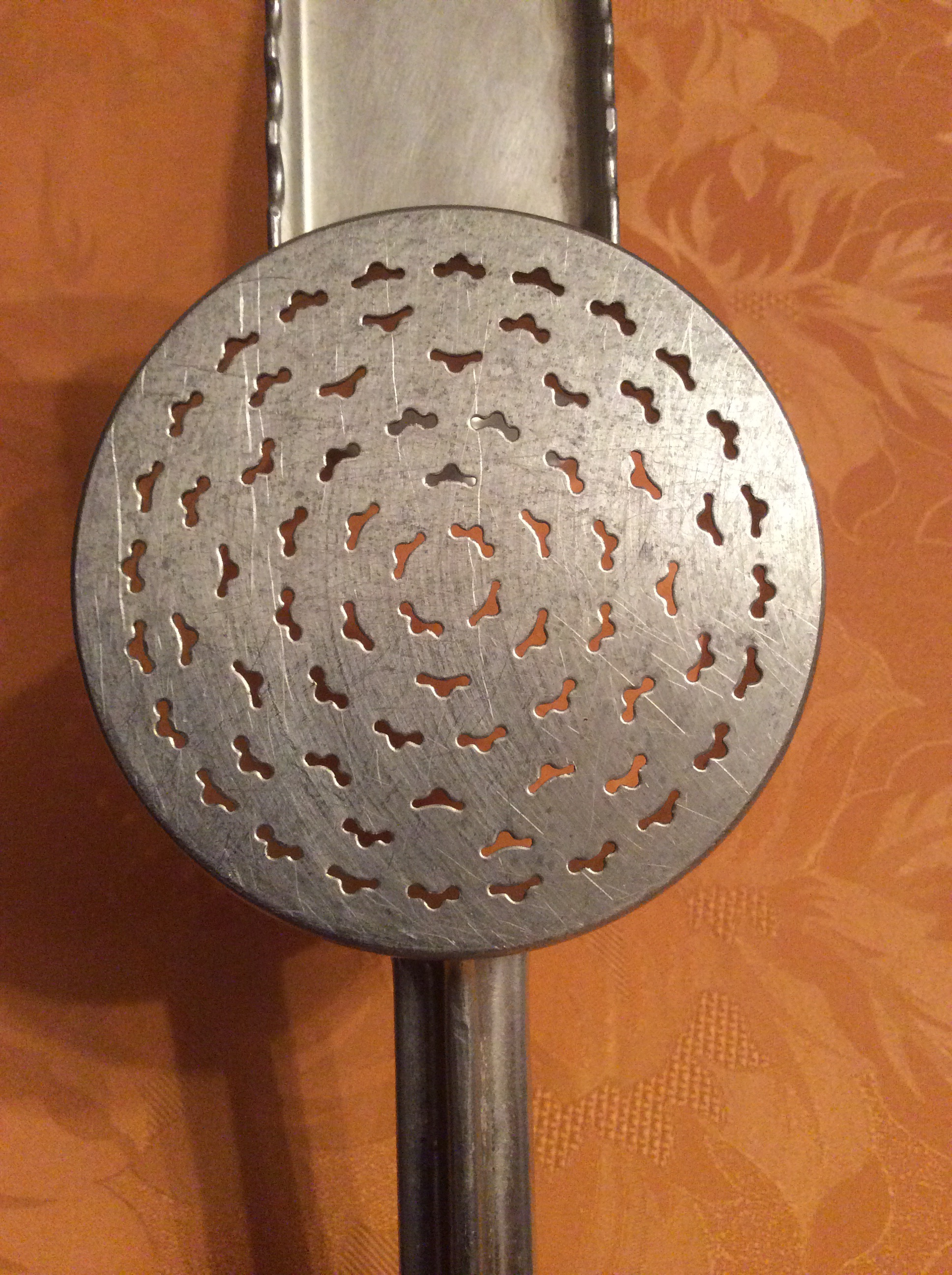 Exemple de modèle de trous pour une presse à spätzle